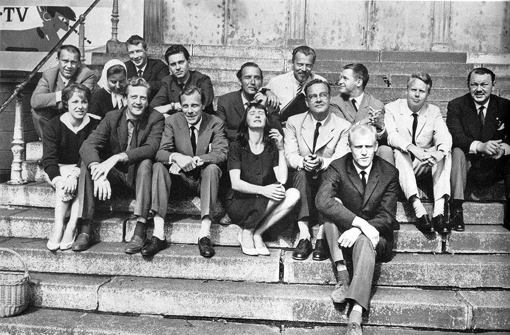 TV-teaterensemblen 1961/62